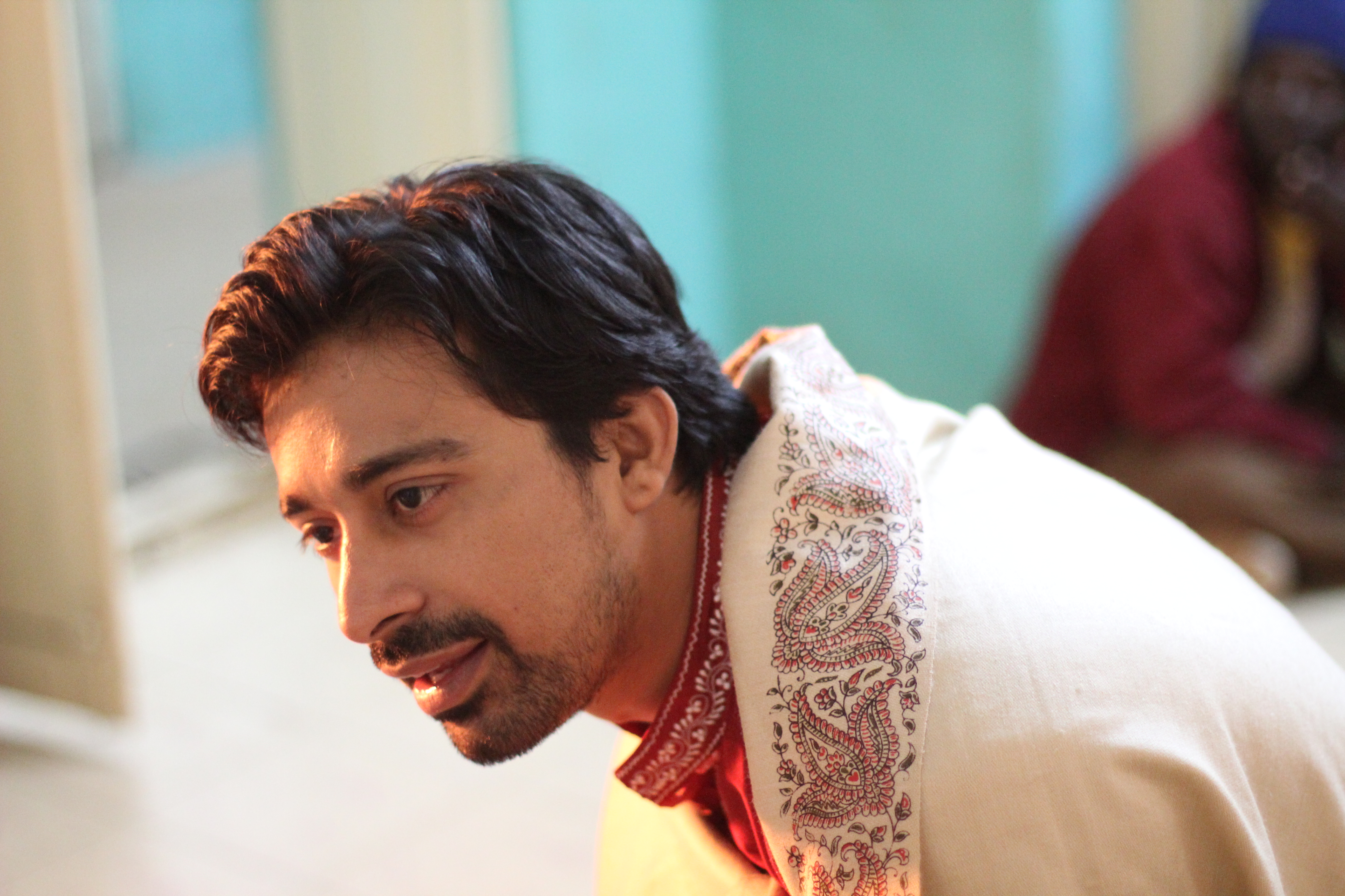 Rannvijay Singh at an event in in Dairy Farm, Udhagamandalam, TN, IN.